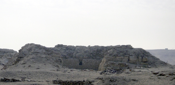 Pyramid Lepsius XXIV in Abousir